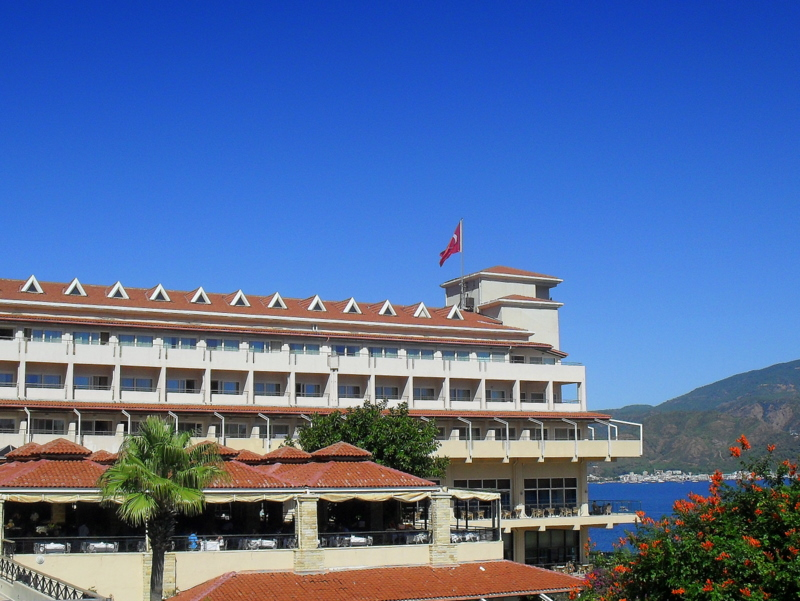 Marmaris, hotel Mares - 1 X 2011 r.